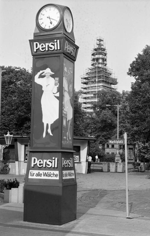 11.-18.8.1991 Bundesland Sachsen-Anhalt, Genthin "Persil" im Stadtbild